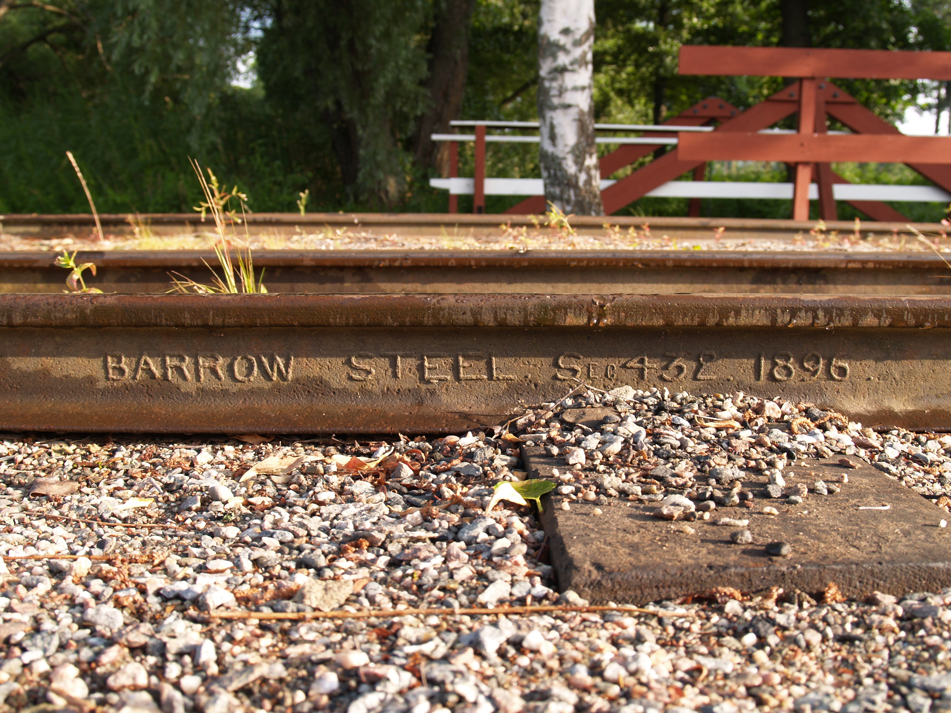 Rail, made by Barrow Steel in 1896, gesehen im Bahnhof Mariefred, Södermanland, Schweden